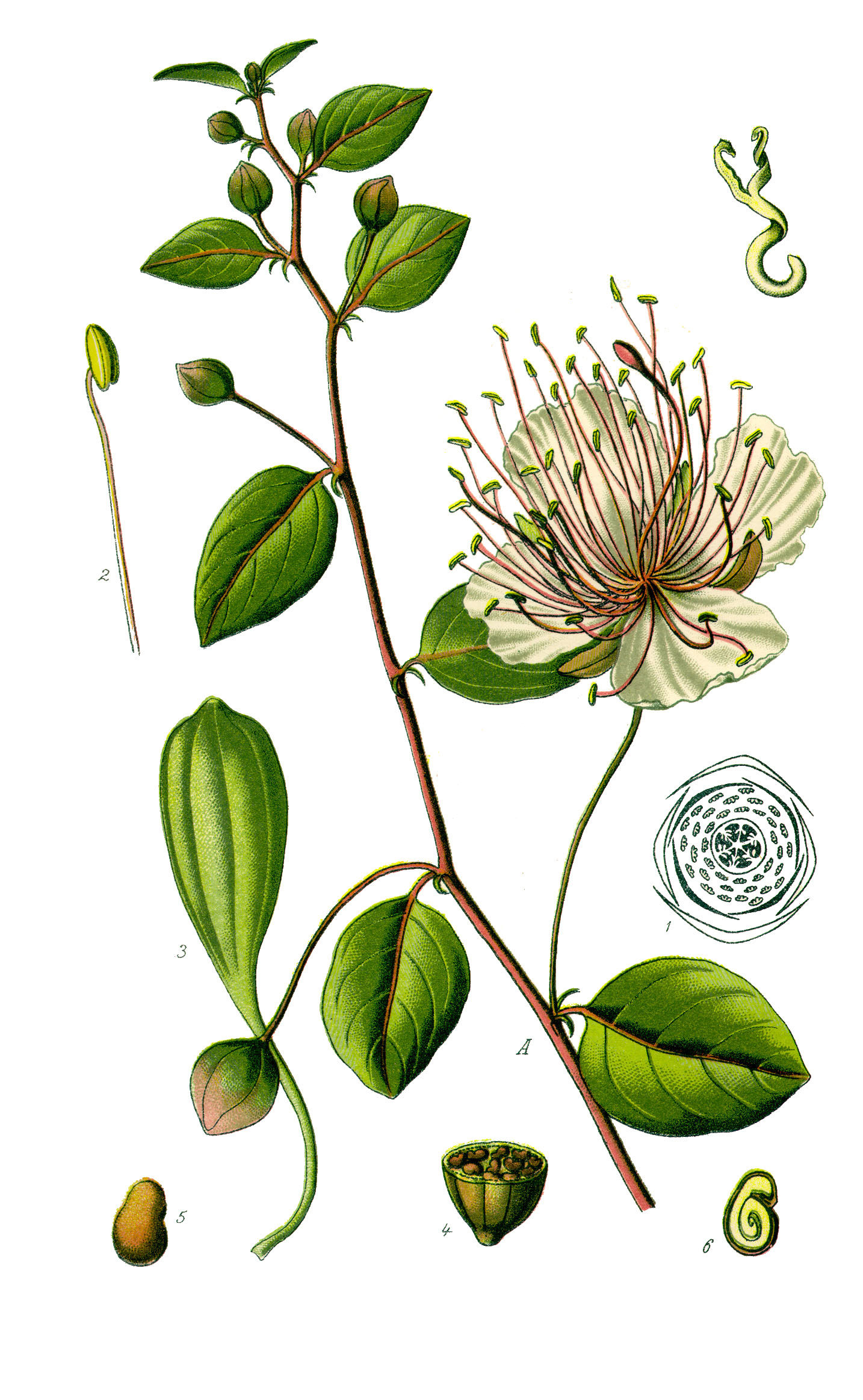 Capparis spinosa L. = Caper